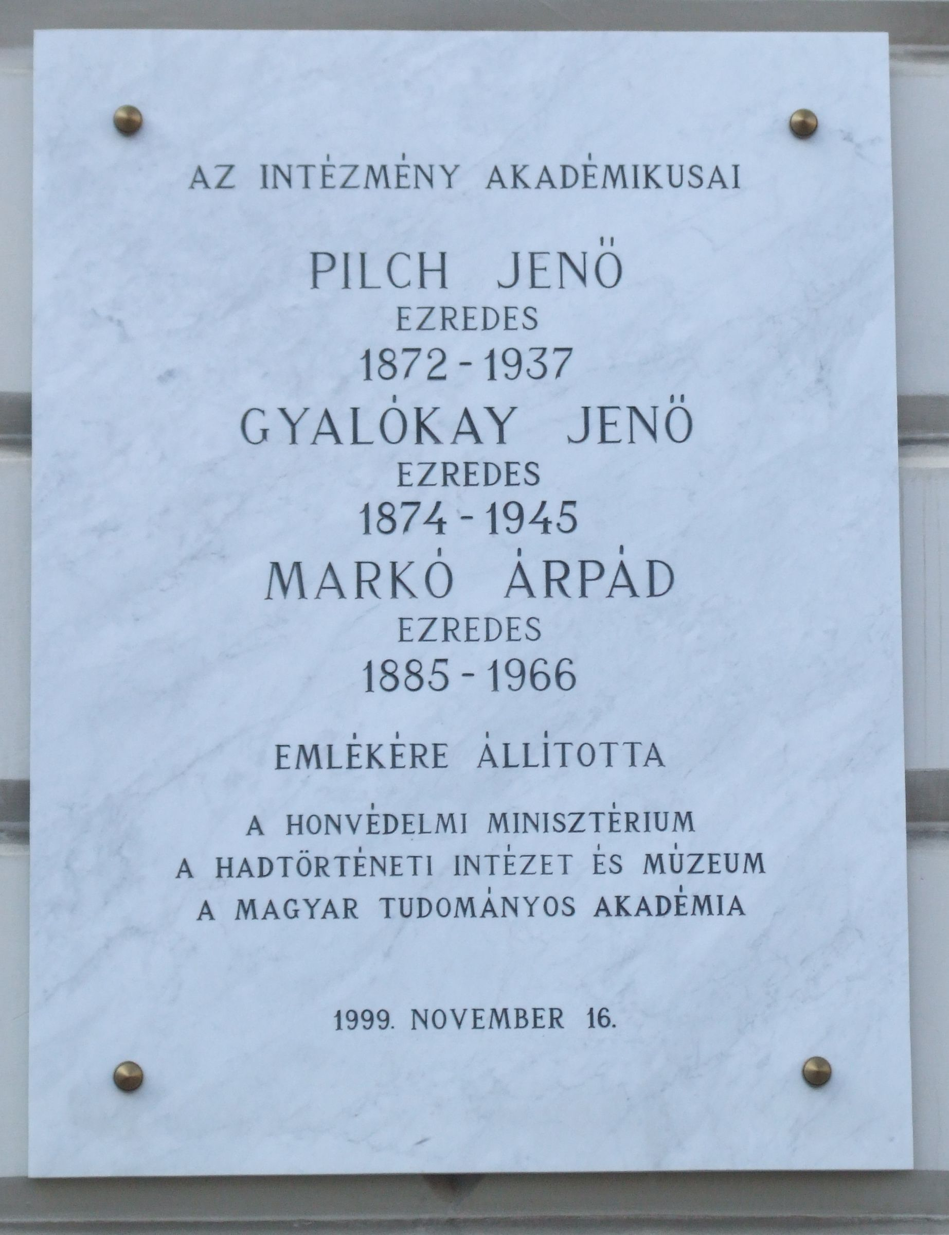 A Hadtörténeti Intézet akadémikusainak emléktáblája. Budapest I. kerület, Kapisztrán tér 2-4. (Hadtörténeti Intézet)